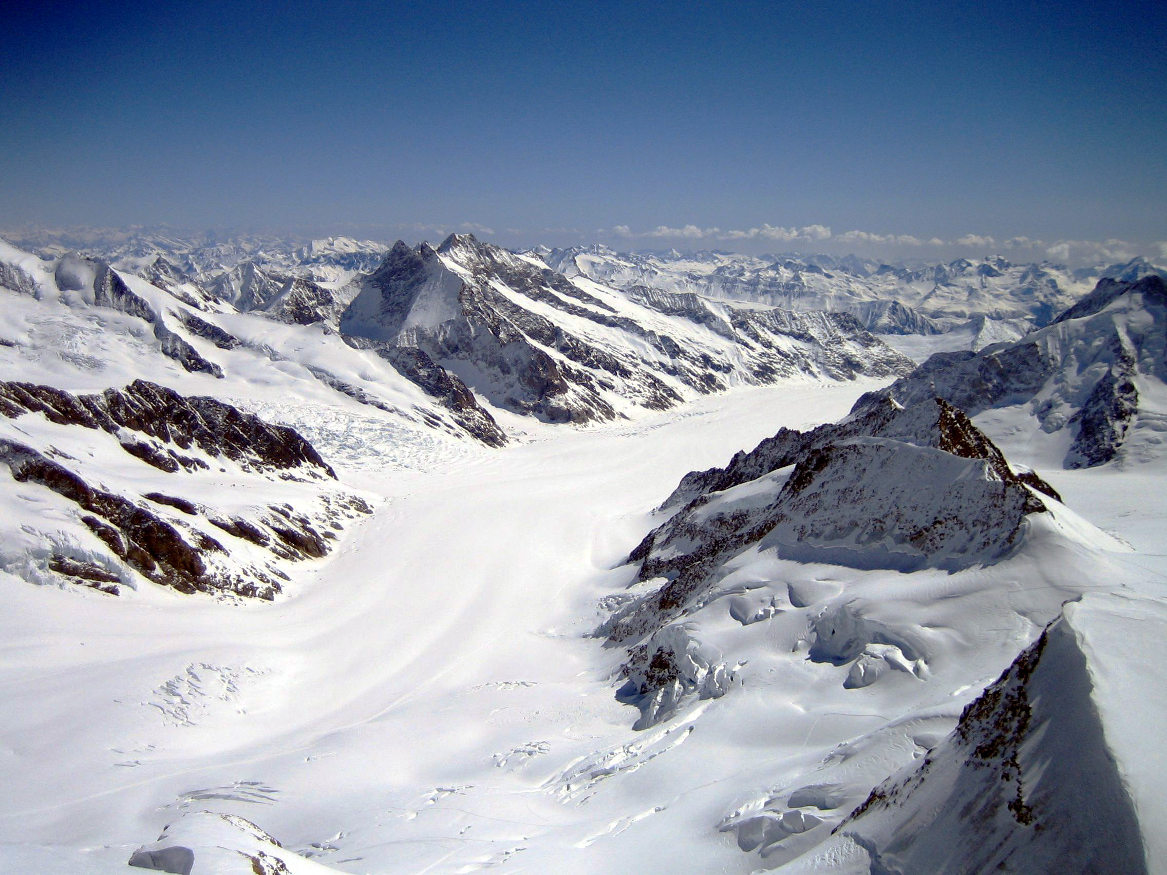 Blick von der Jungfrau zum Konkordiaplatz